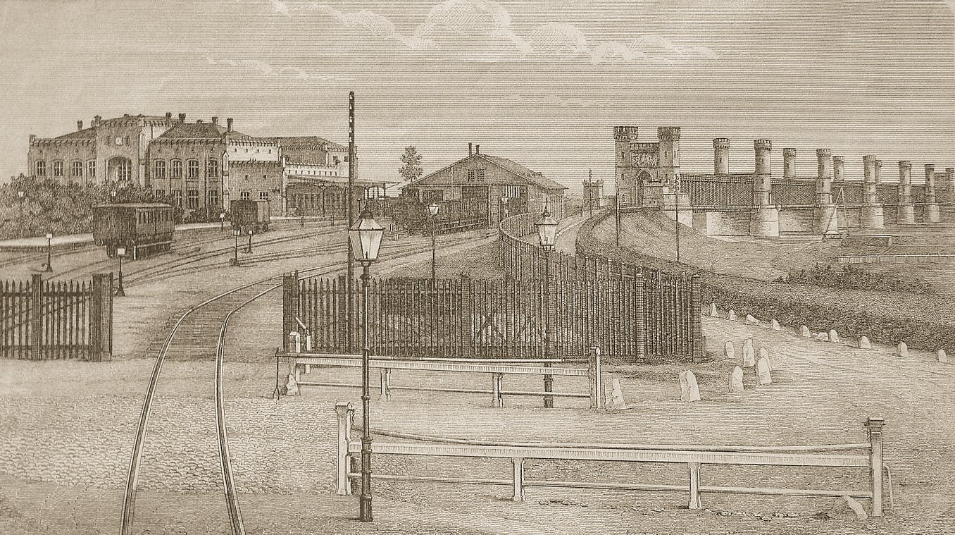 Die Weichselbrücke bei Dirschau.